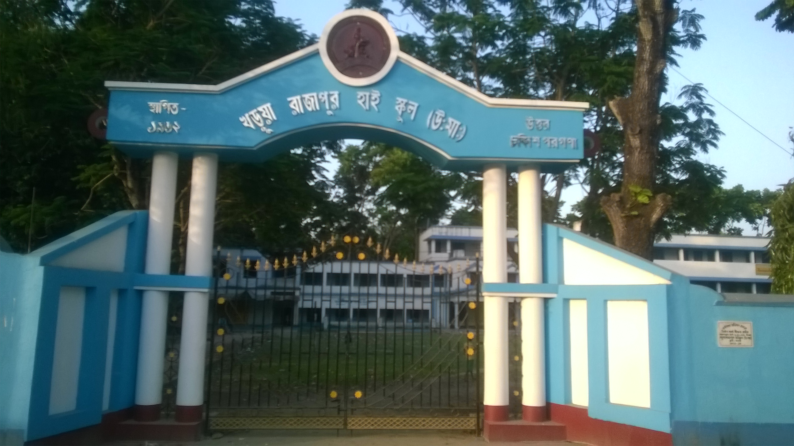 খডুয়া রাজাপুর উচ্চবিদ্যালয়ের প্রধান গেট Kharaua rajapur high school main gate